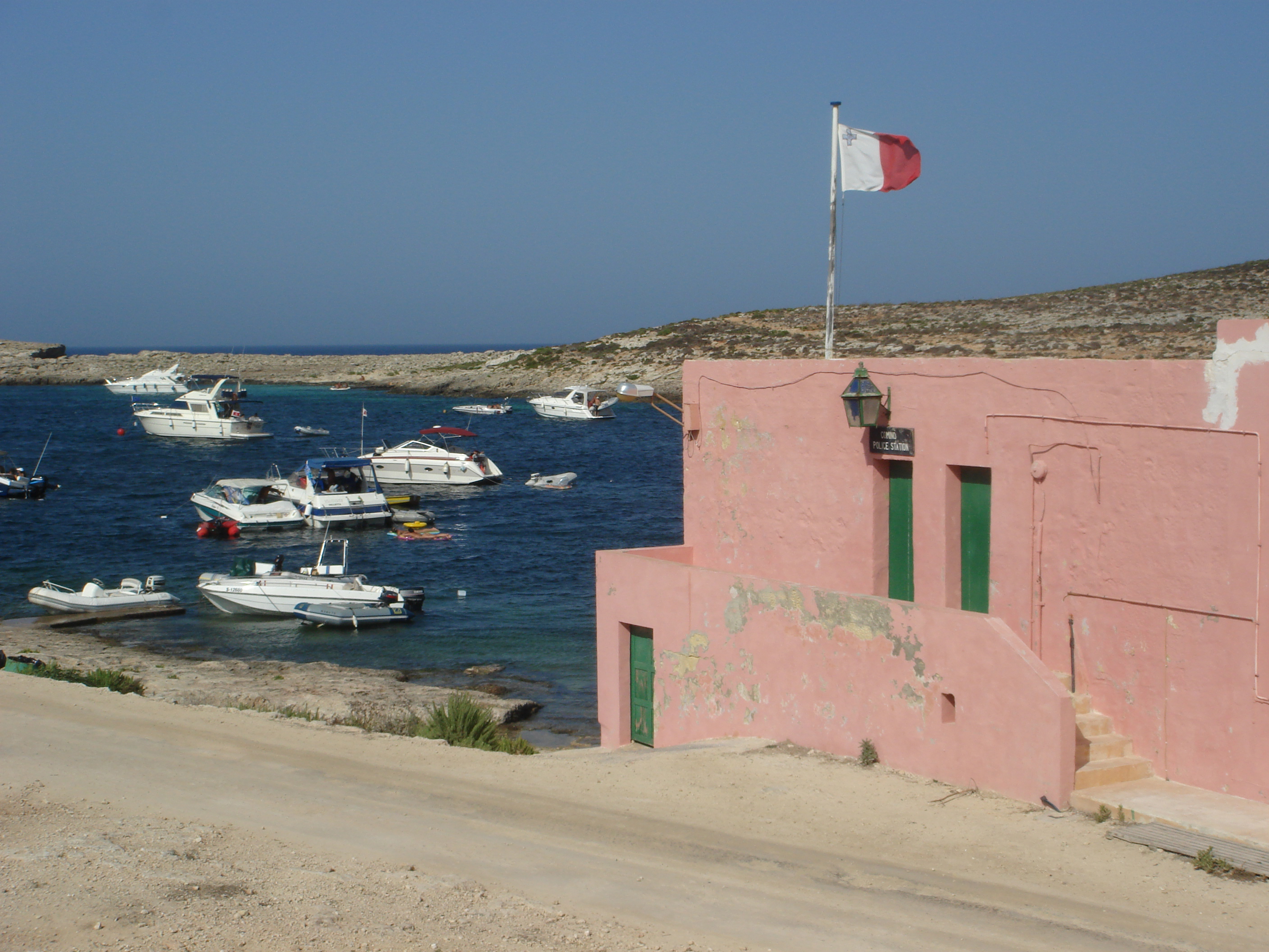 Police Station in Comino, Malta